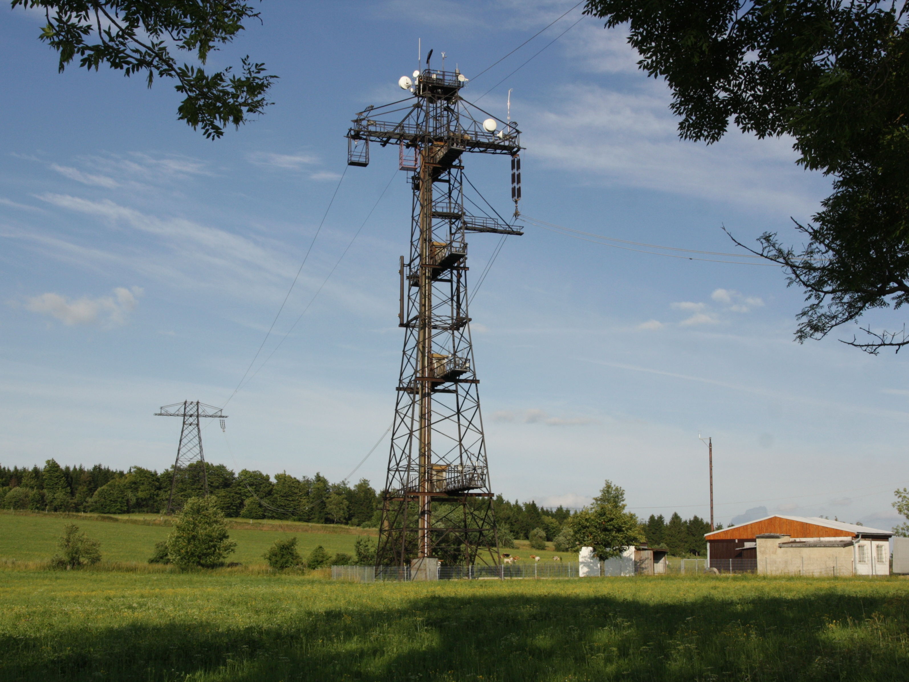 Studnice (Nové Město na Moravě) - zkušební vedení pro měření námrazy.